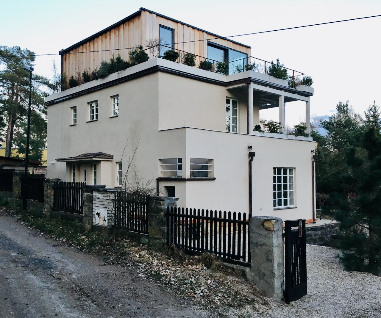 Vlastní villa architekta Otto Kohna ve Starých Splavech.